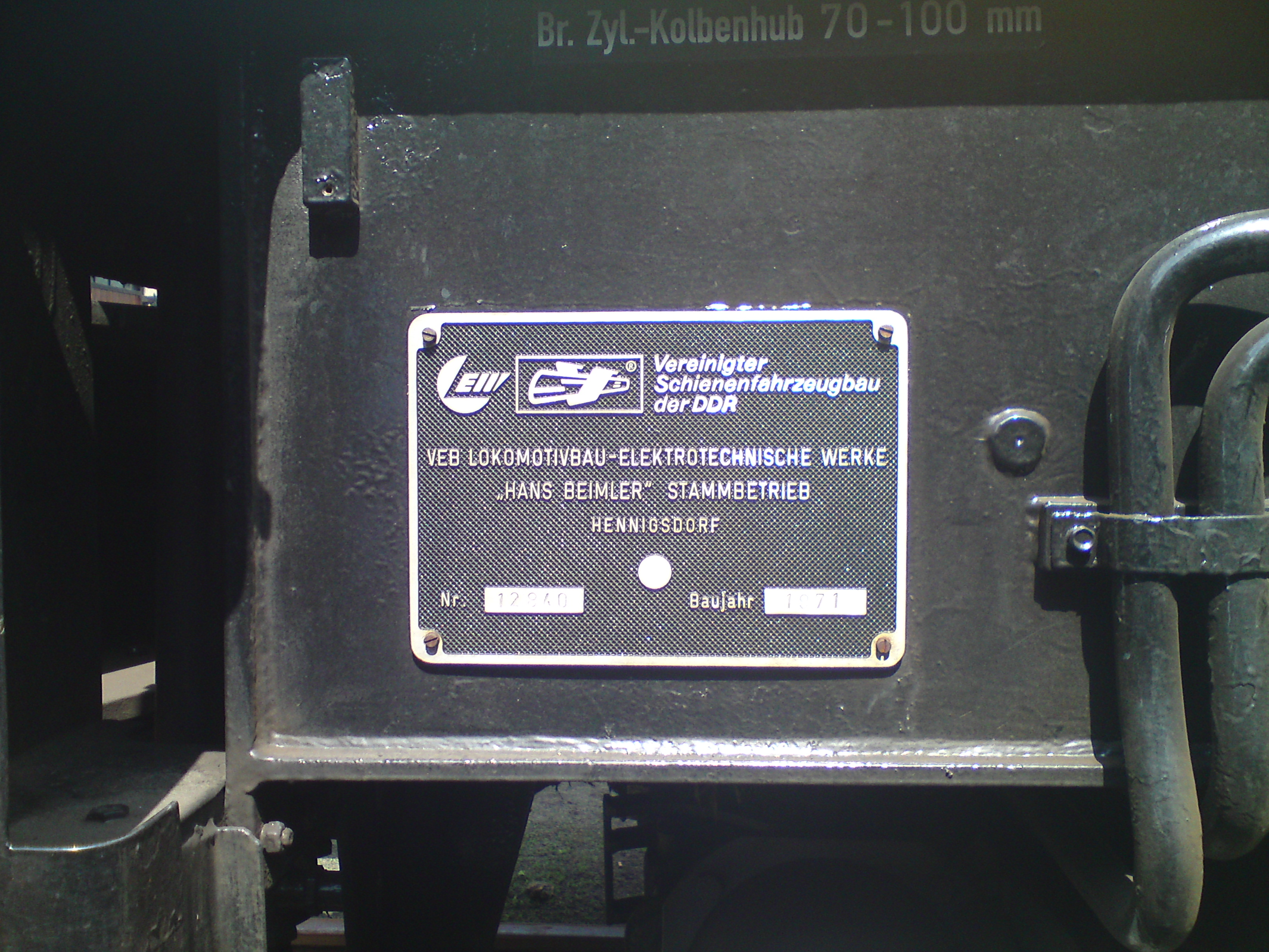 Fabrikschild einer V100